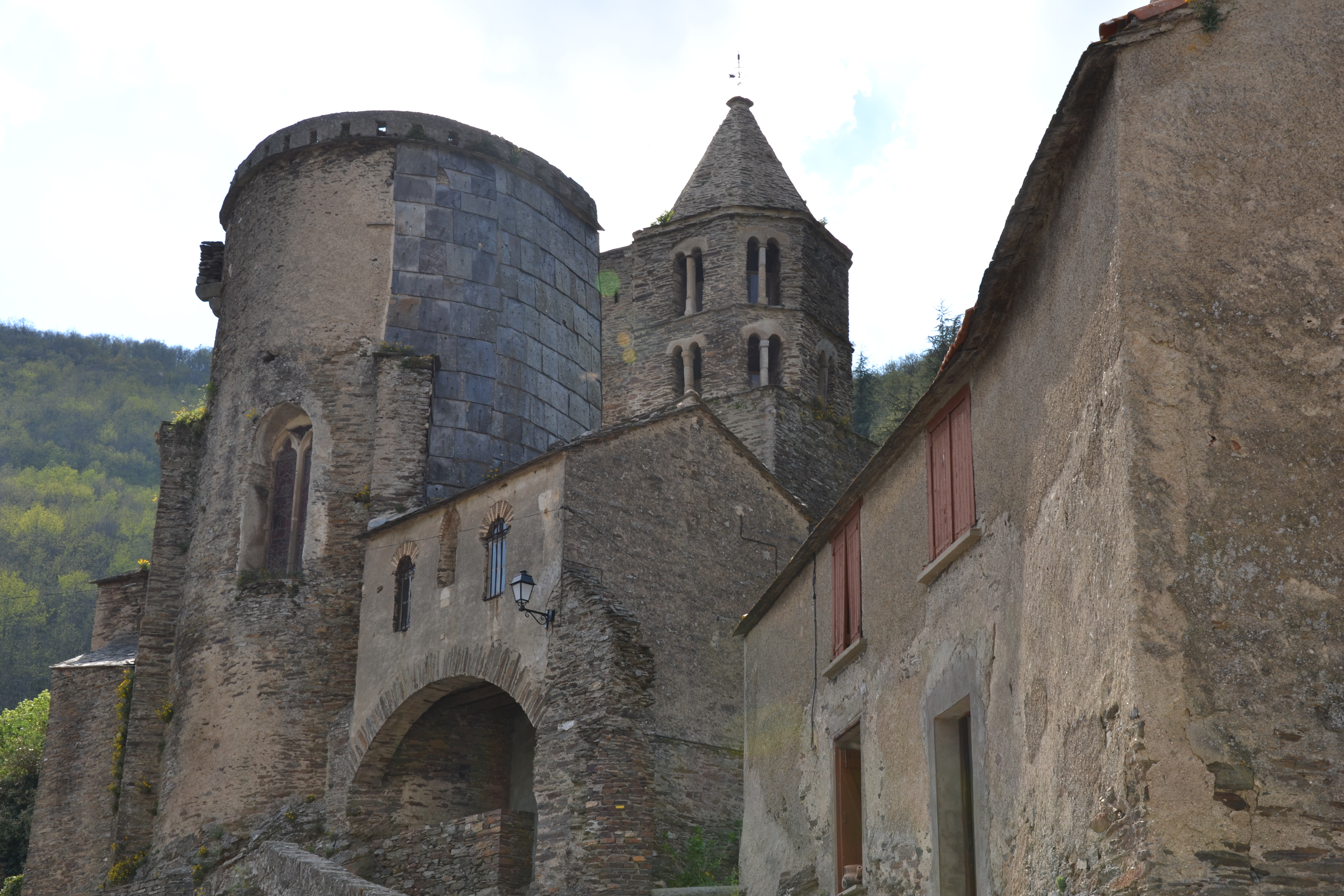 Église et bâtiment adjacent à La Tourette-Cabardès (Aude, Languedoc-Roussillon, France).